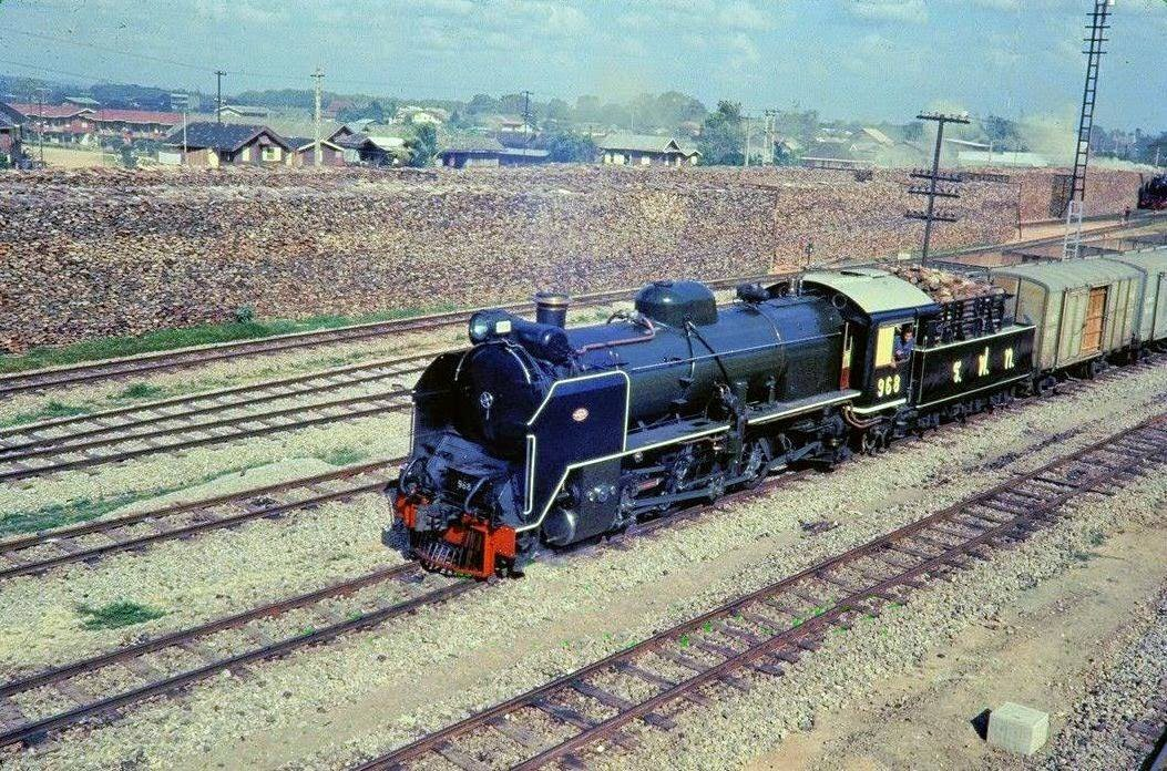 รถจักรไอน้ำมิกาโดะ DX50 หมายเลข 968 ขณะทำขบวนรถสินค้าออกจากสถานีรถไฟชุมทางหาดใหญ่, จังหวัดสงขลา เมื่อปี พ.ศ. 2512